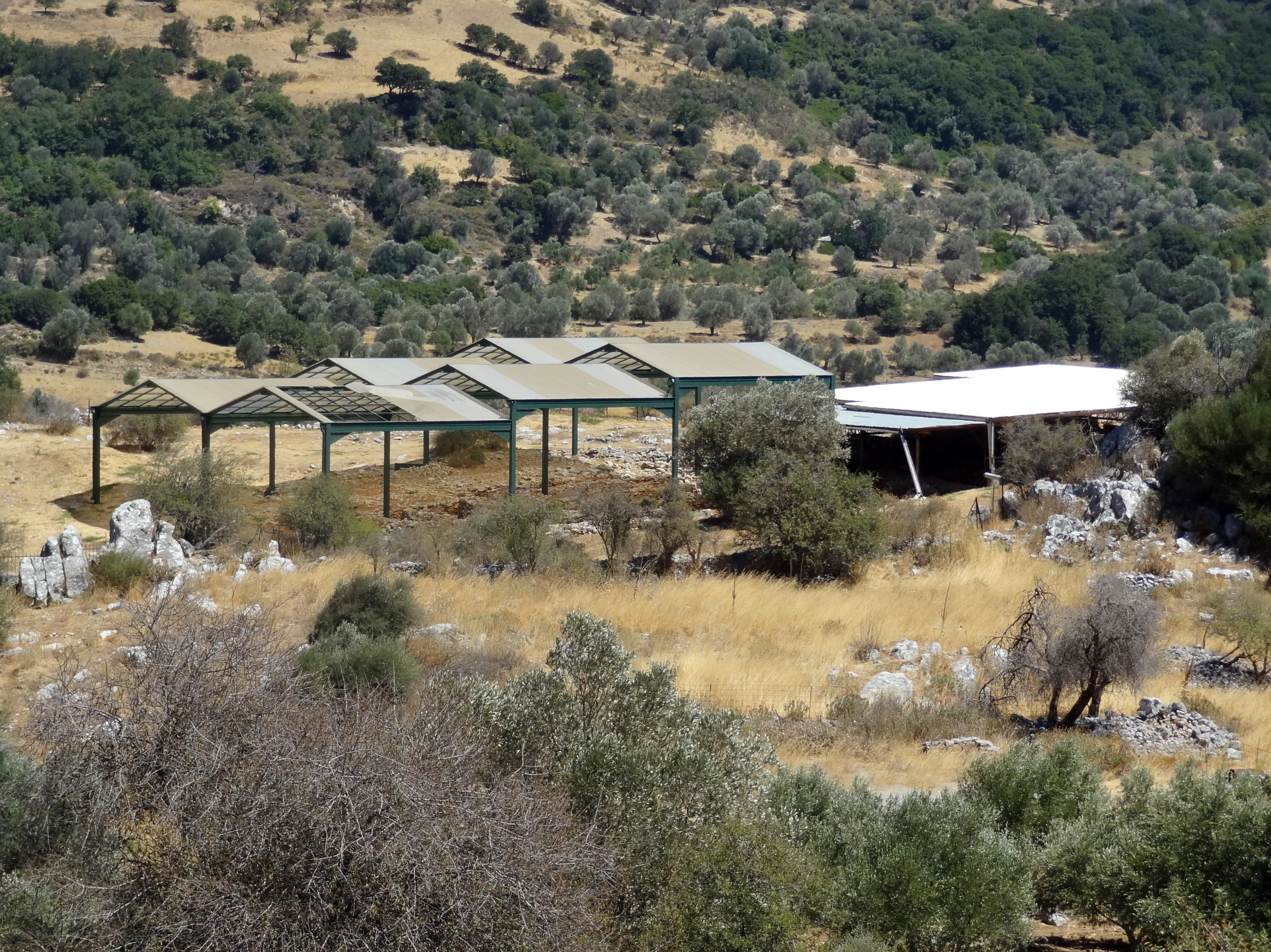 Archäologische Ausgrabungsstätte von Monstiraki (Μοναστηράκι), Gemeinde Amari, Regionalbezirk Rethymno, Kreta, Griechenland